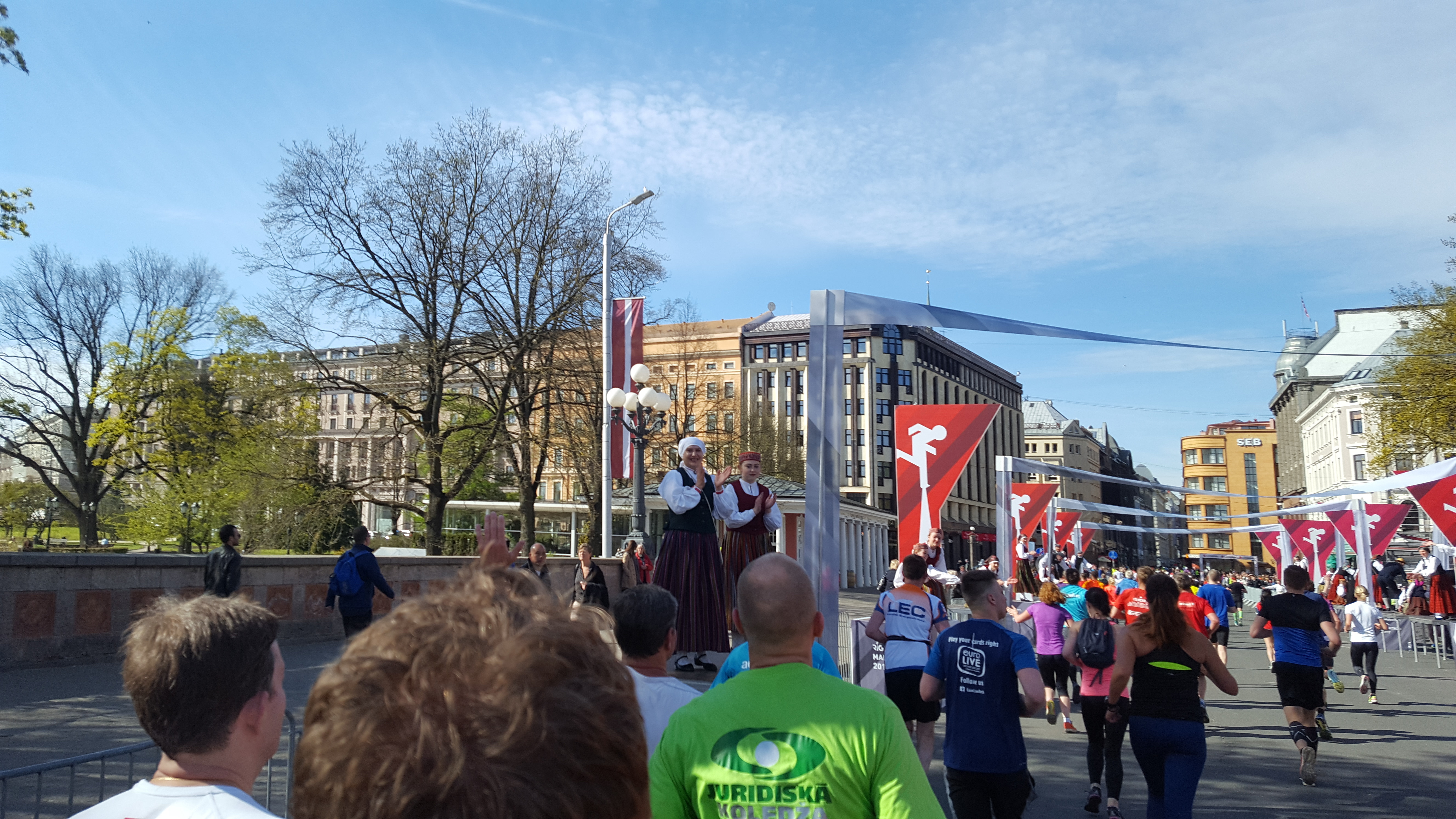 Lattelecom Riga Marathon 2017. Lauf durch Old Town Riga